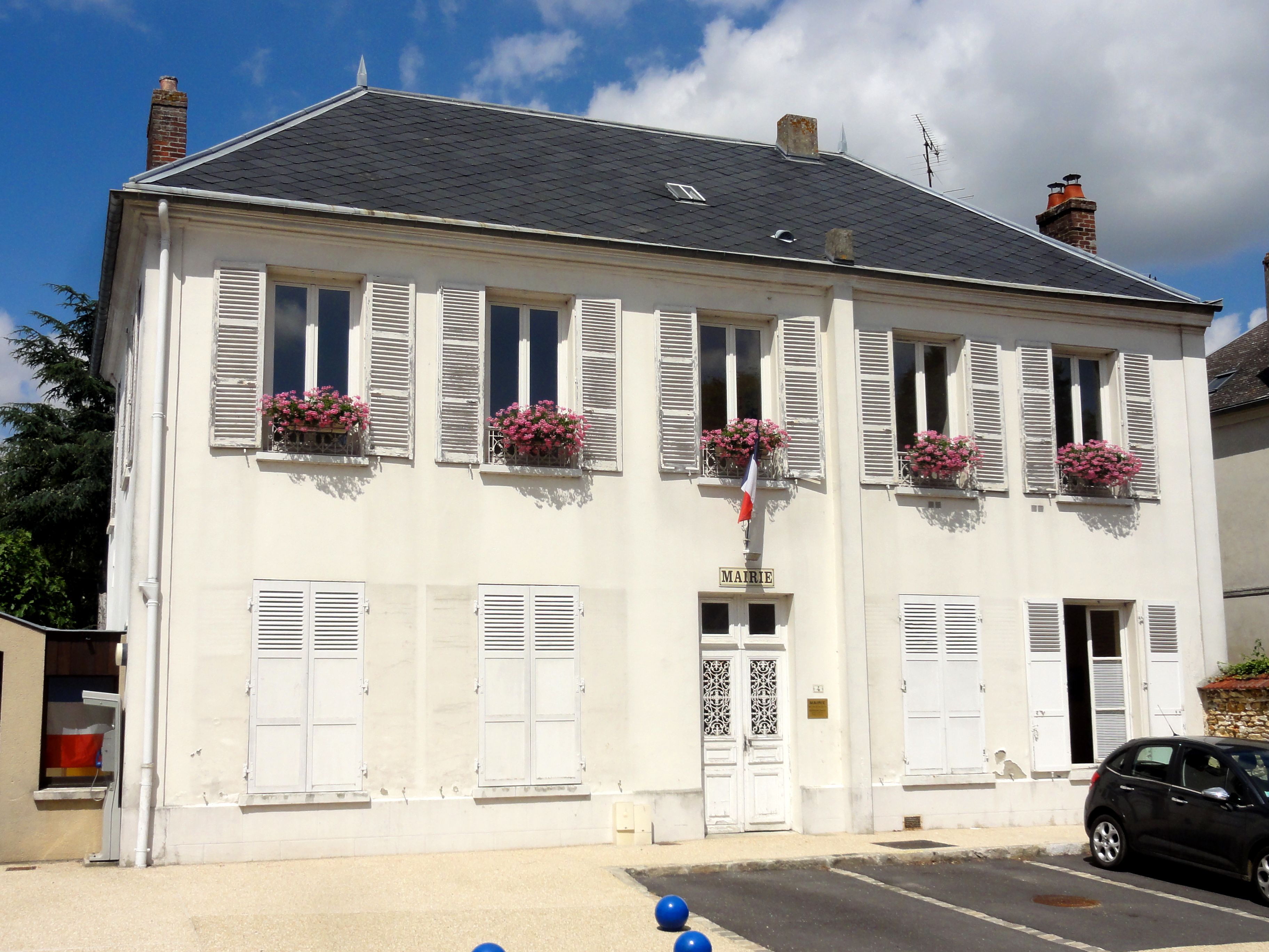 La mairie, rue de la Liberté.